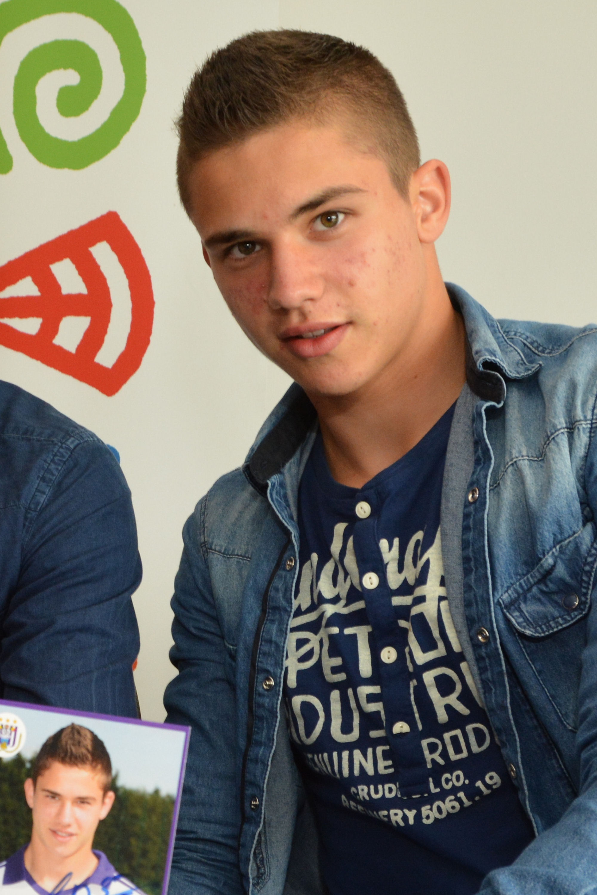 Leander den Doncker. Voetballer bij RSC Anderlecht tijdens een signeersessie in het Doe-centrum Technopolis Mechelen